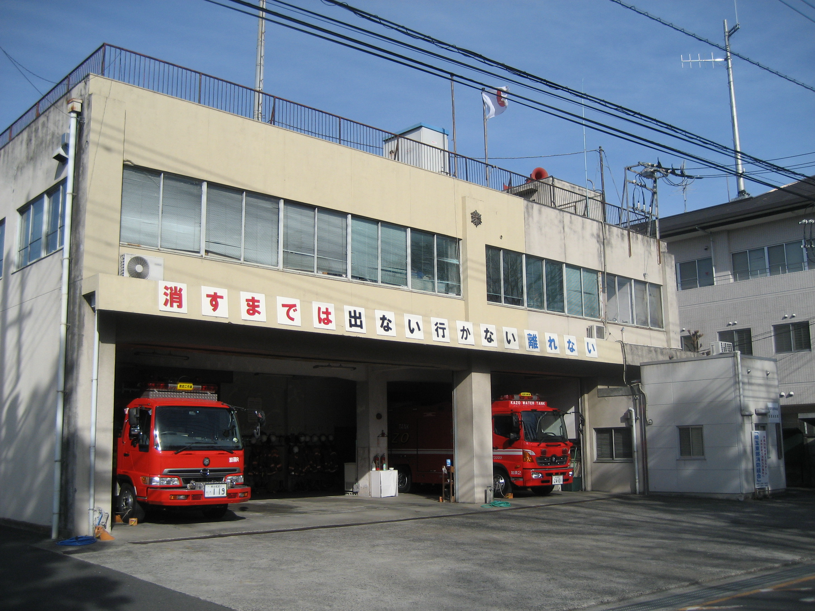 加須市消防本部・消防署庁舎